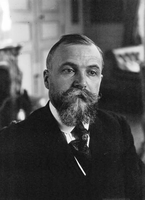 M. Henry Simon ministre des Colonies : photographie de presse